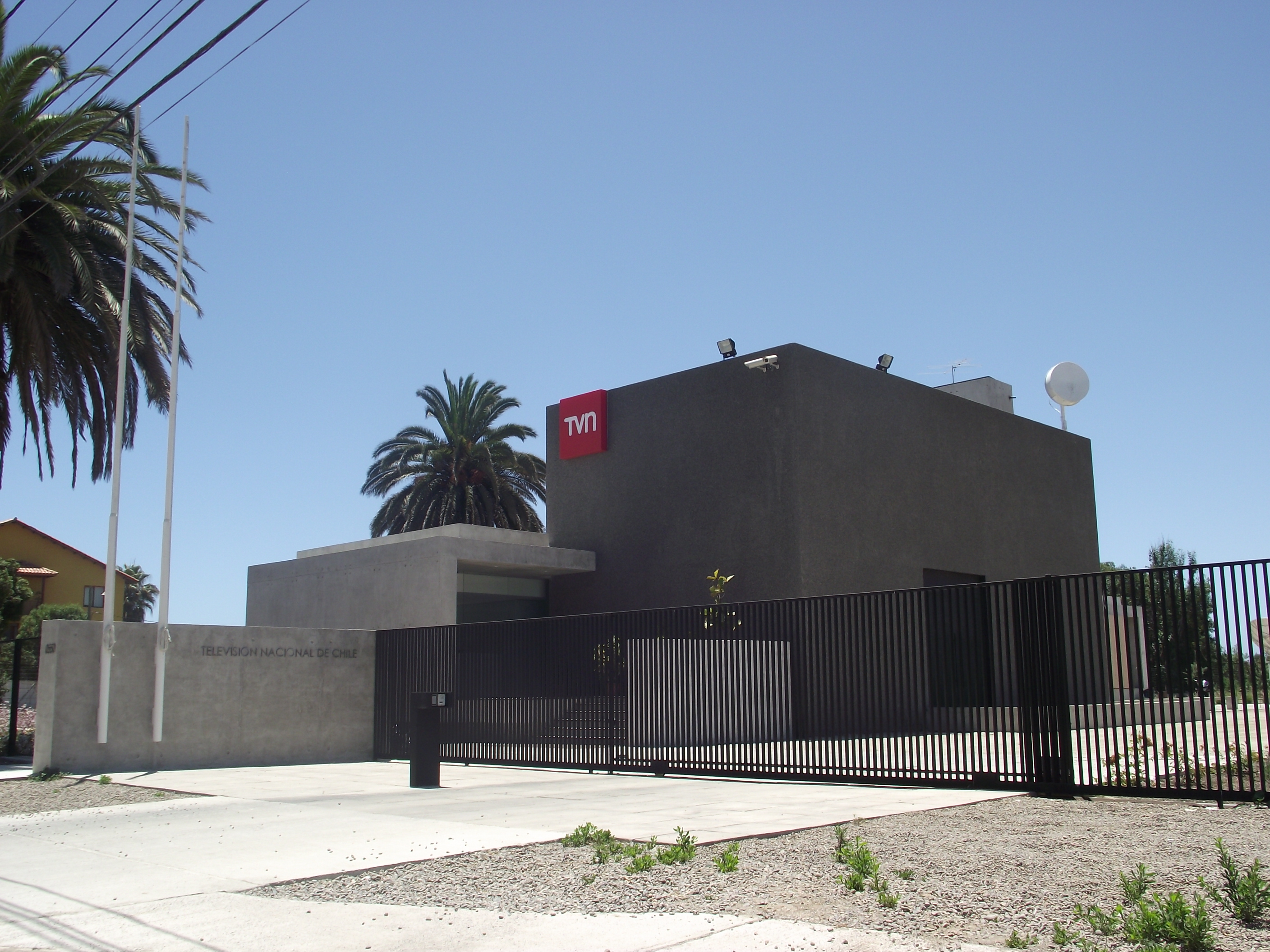 Oficinas y estudios de Televisión Nacional de Chile Red Coquimbo, ubicados en la ciudad de La Serena.